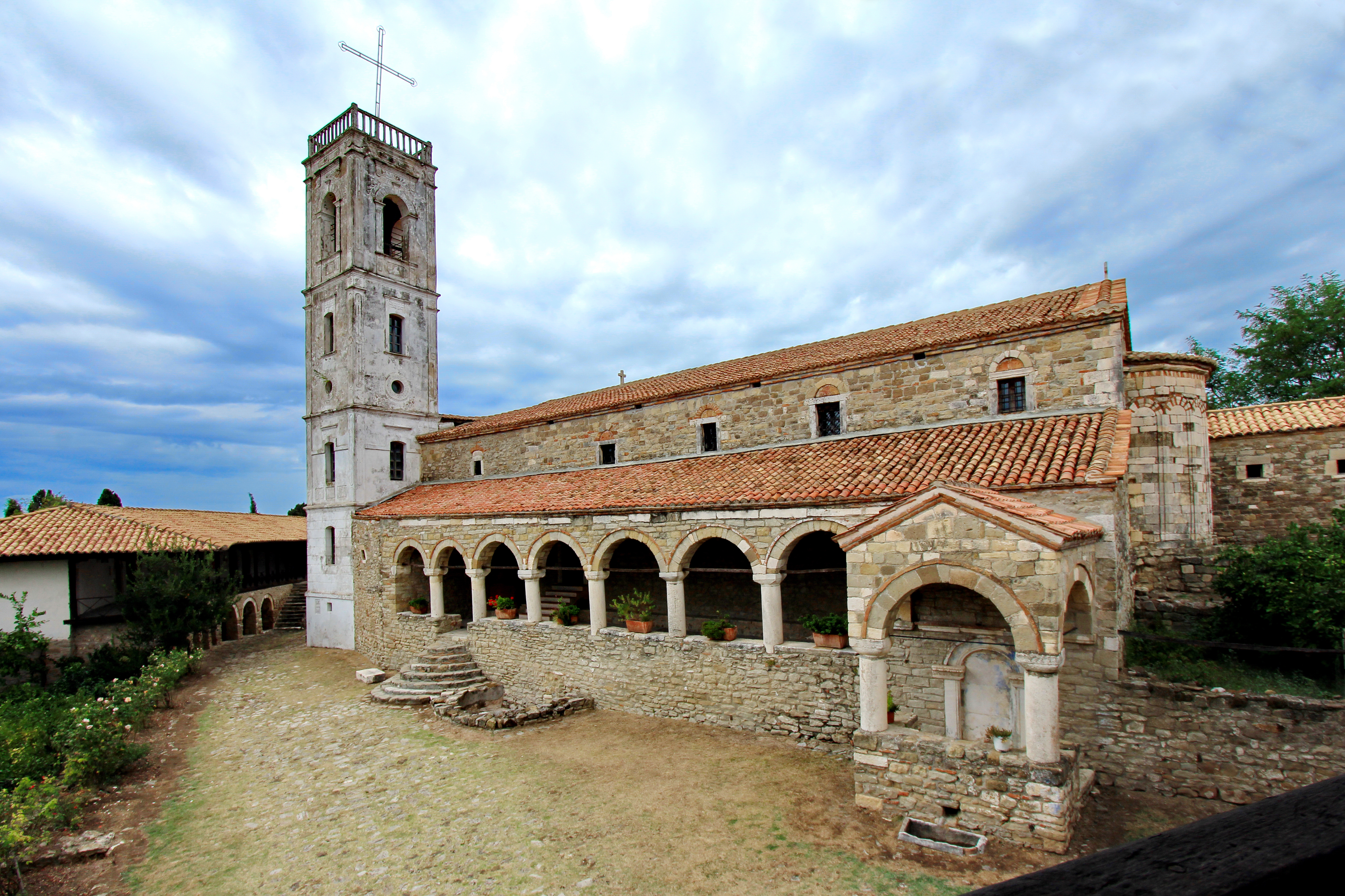 Manastiri i Shen Mërisë (Ardenicë)